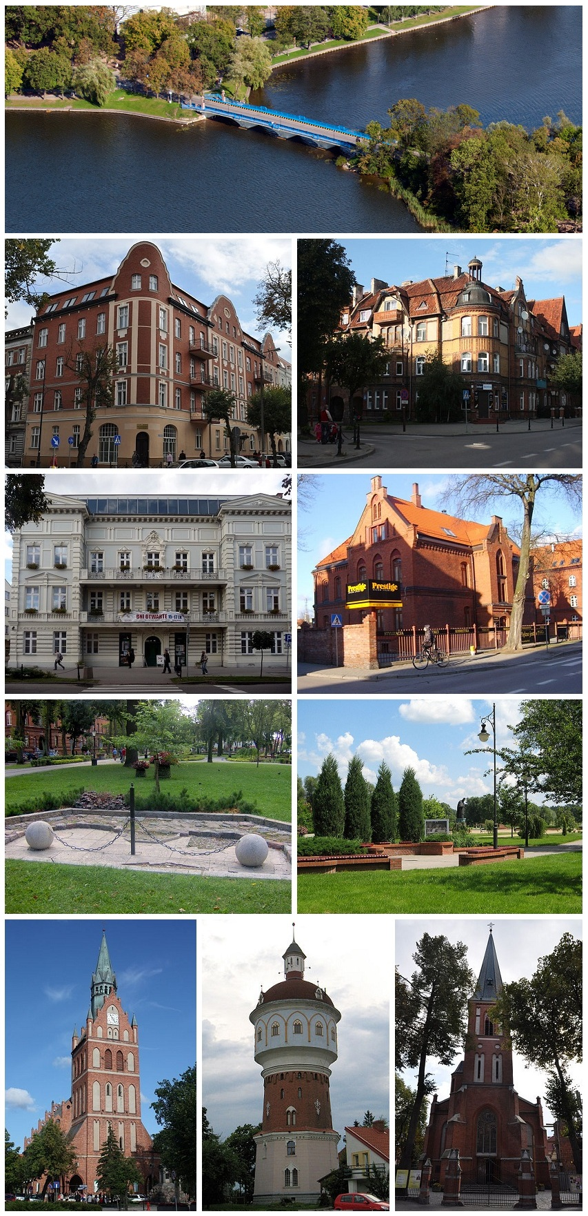 U góry: Most na Jeziorze Ełckim; drugi rząd: Kamienice przy ulicach Mickiewicza i Kościuszki; trzeci rząd: Szkoła Artystyczna i dawna jednostka wojskowa; czwarty rząd: Park Solidarności i Plac Jana Pawła II; piąty rząd: Kościół Najświętszego Serca Pana Jezusa, wieża ciśnień, Katedra św. Wojciecha